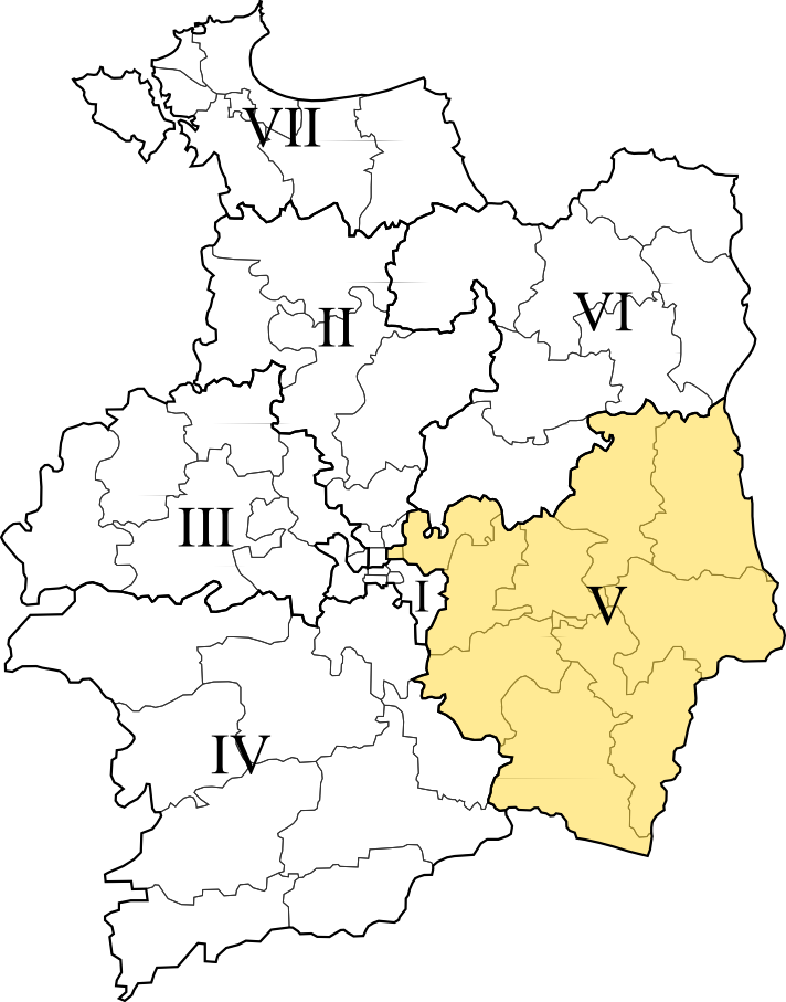 Carte de la cinquième circonscription d'Ille-et-Vilaine